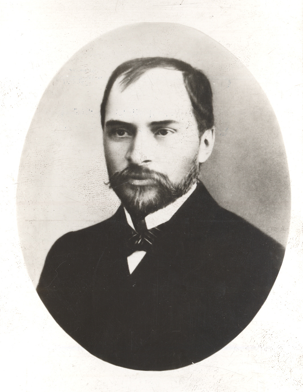 Fotografie-portret a poetului român George Coşbuc (1866 - 1918), Biblioteca Judeţeană "Octavian Goga" Cluj, Fondul Emil Isac